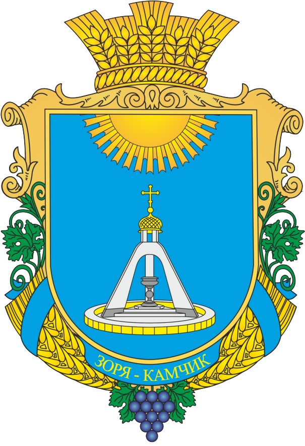 герб села Зоря (Саратський район)